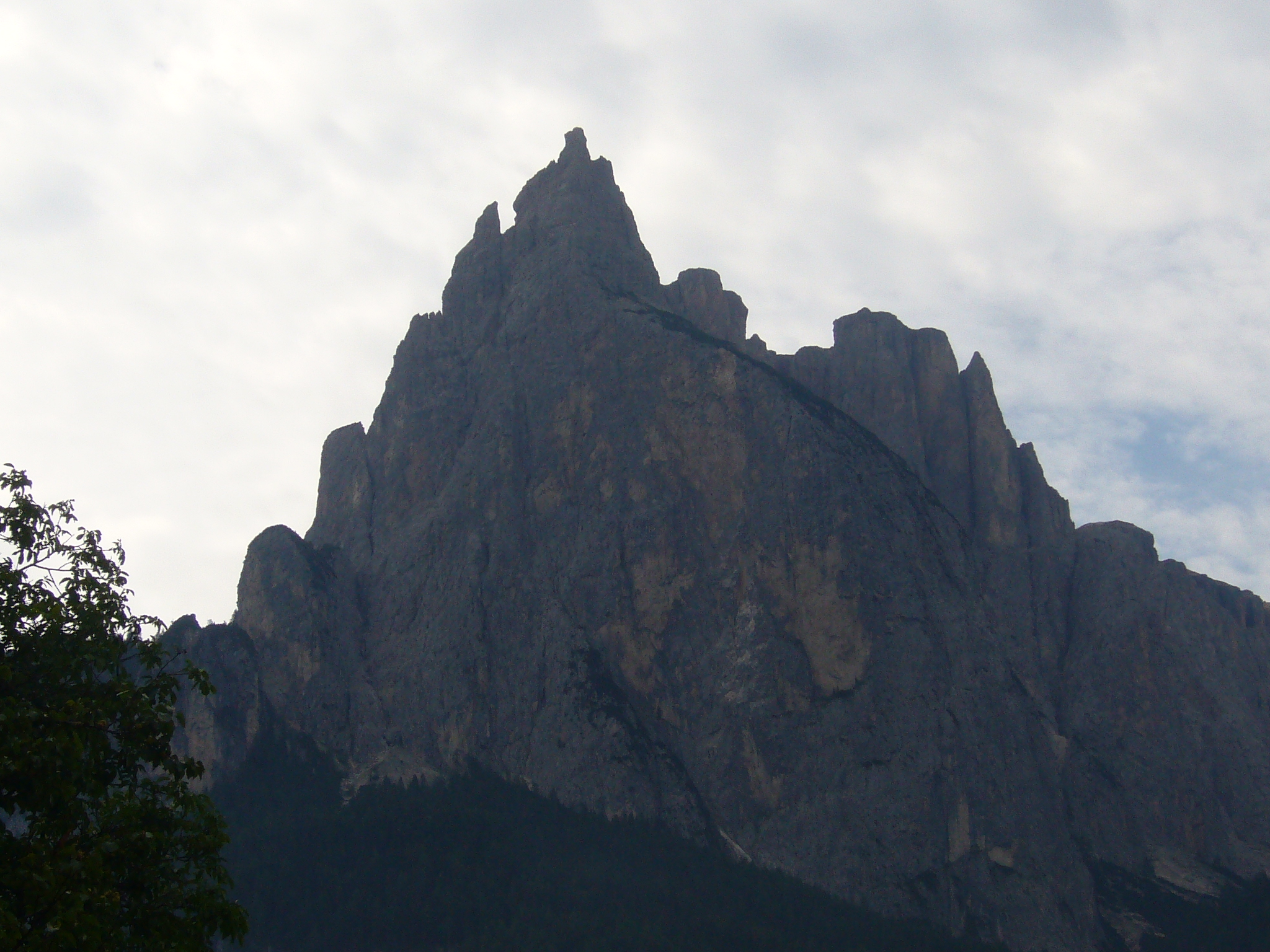 Der Schlern von Seis aus gesehen